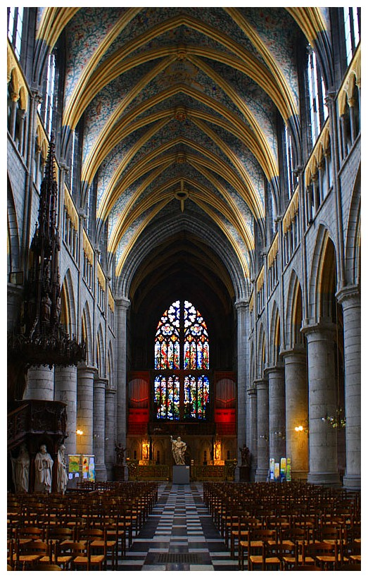 Interieur Sint Pauluskathedraal, Luik